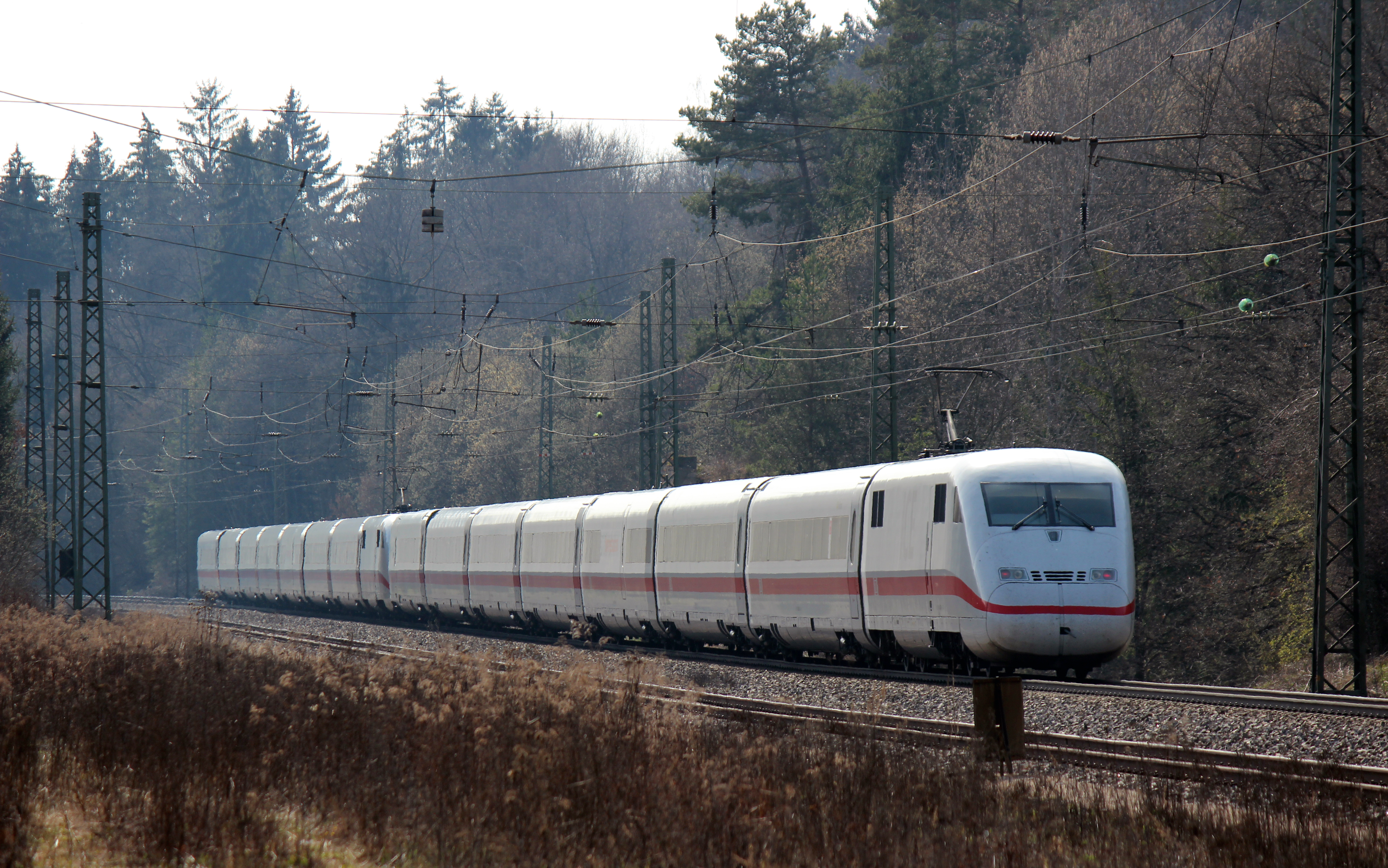 Aufnahmen vom 30. März 2014. Verschiedene Motive rund um die Bahnstrecke Möhren-Treuchtlingen (Bayern) und dem Bahnhof Treuchtlingen (Bayern).